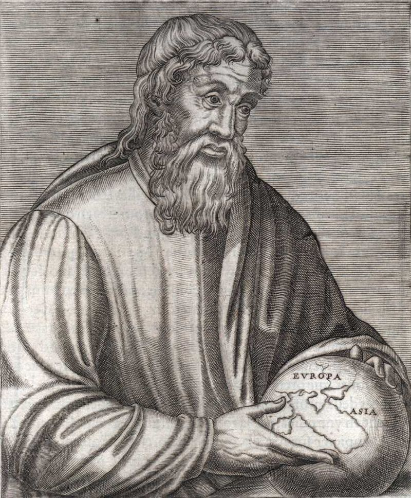 Страбон философ